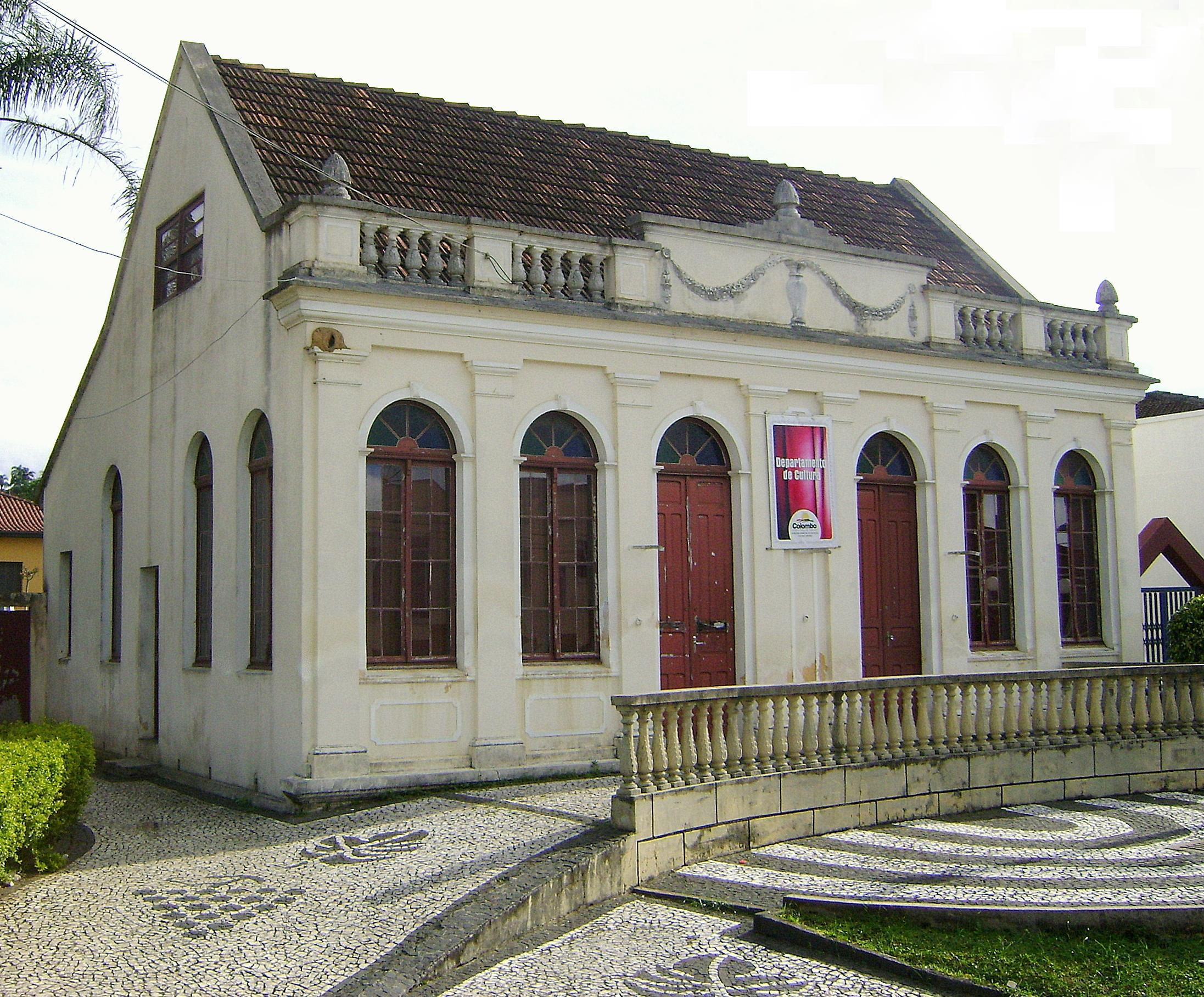 Antiga Câmara Municipal de Colombo (PR, sul do Brasil), atual Casa da Cultura do município.